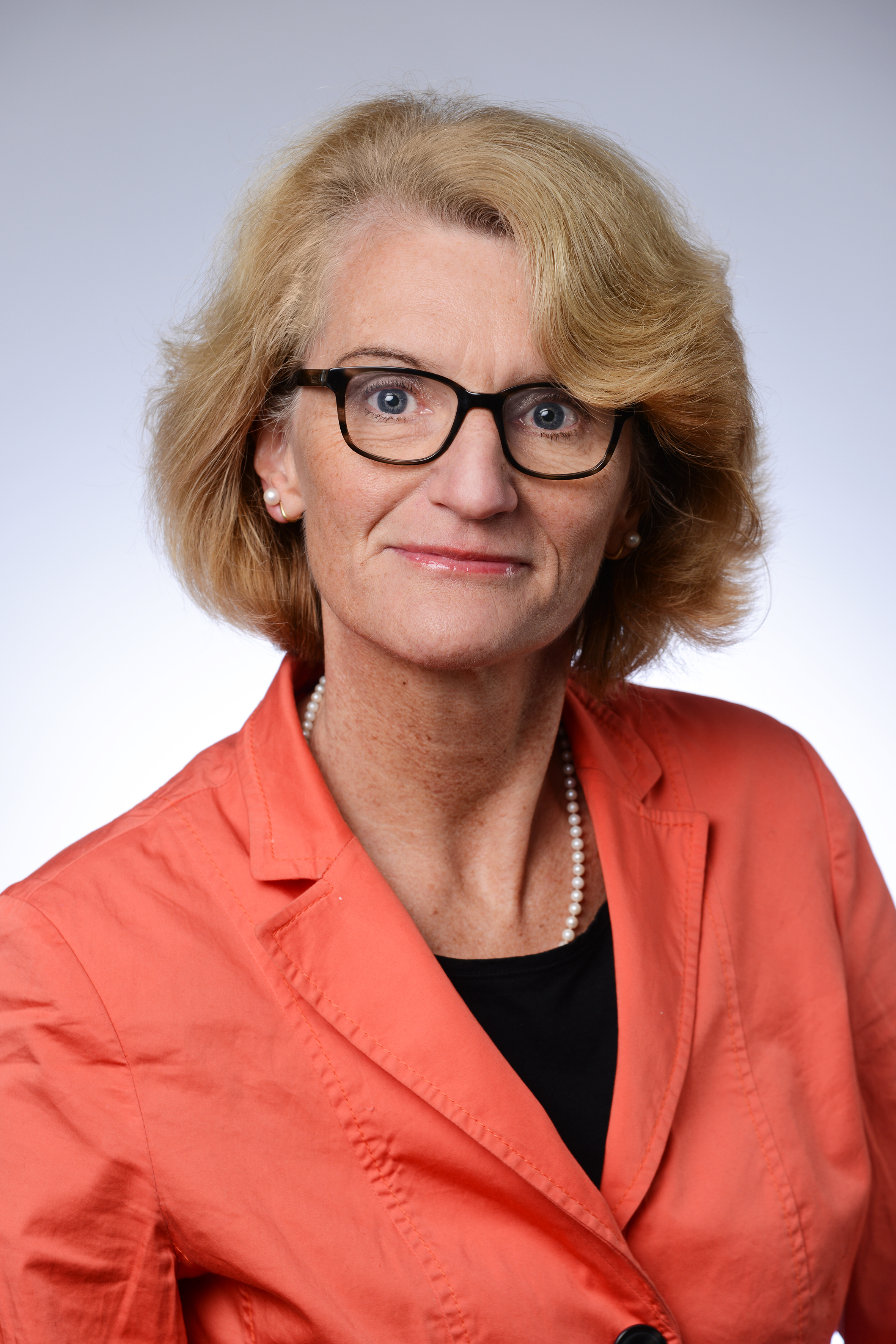 Prof. Dr. Christa Dürscheid (Dezember 2016)